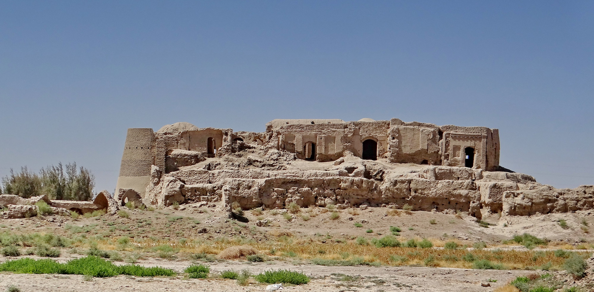 نمای کلی از ارگ خان ملک کیانی